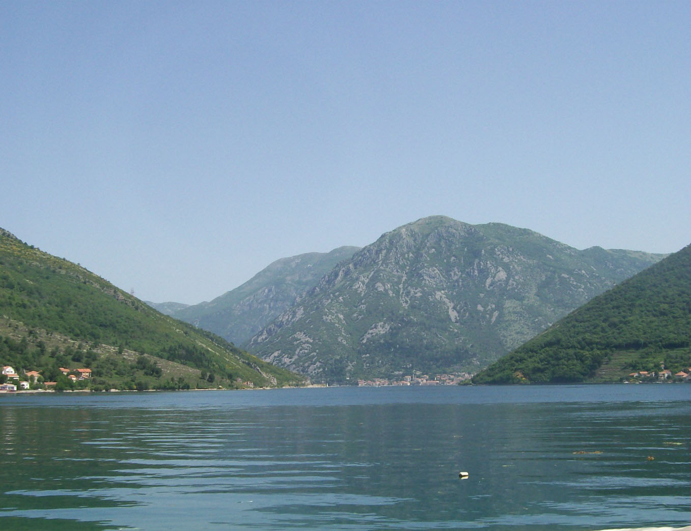 Tjesnac Verige - Boka kotorska